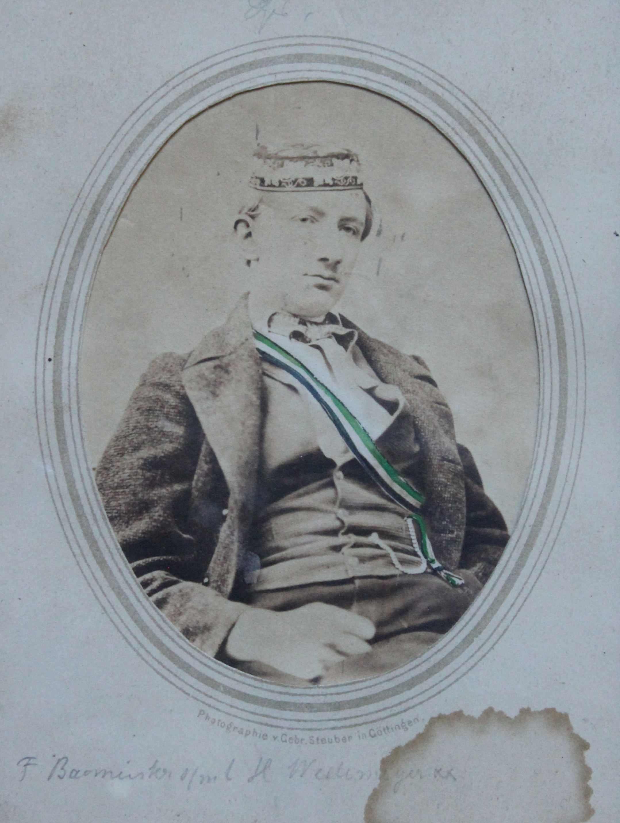 Porträtfotografie von Fritz Bacmeister (1840–1886) als Student in Göttingen